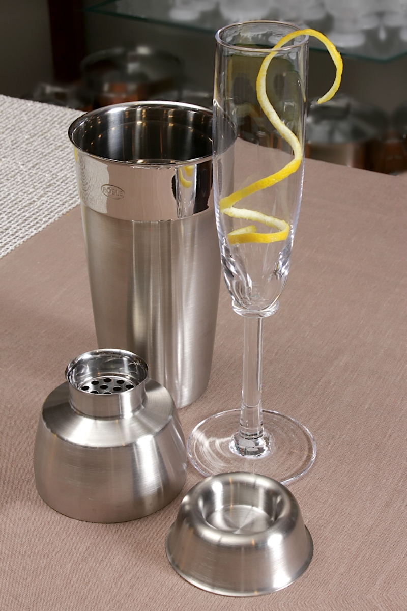 Cocktail-Shaker der Marke Rösle, hier als 3-teiliger Shaker (Cobbler Shaker), zusammen mit einem Sektglas.